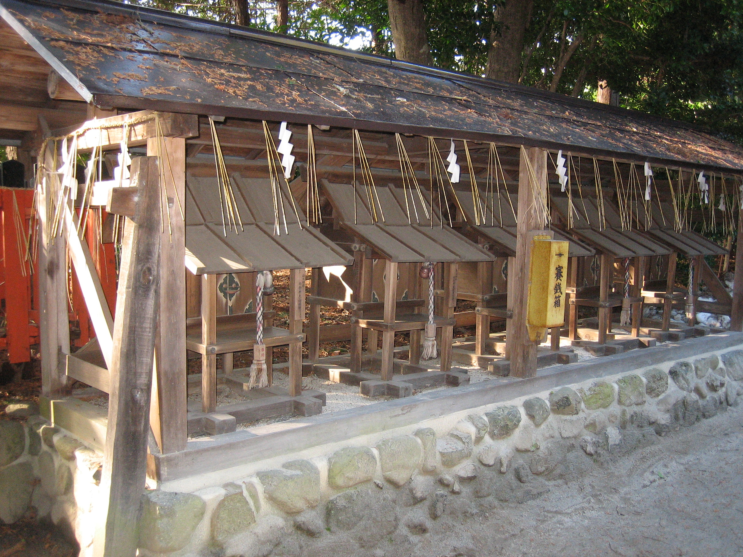 大将軍神社（京都市北区）西側末社を撮影